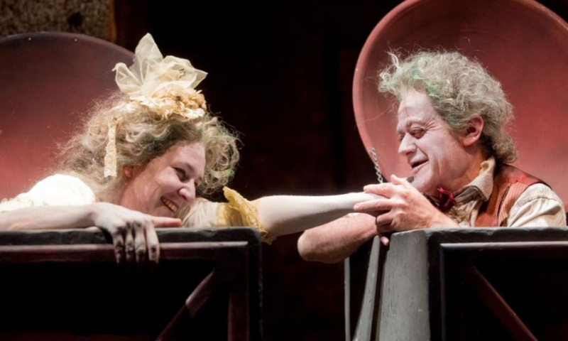 סוף משחק- צלם-גדי דגון